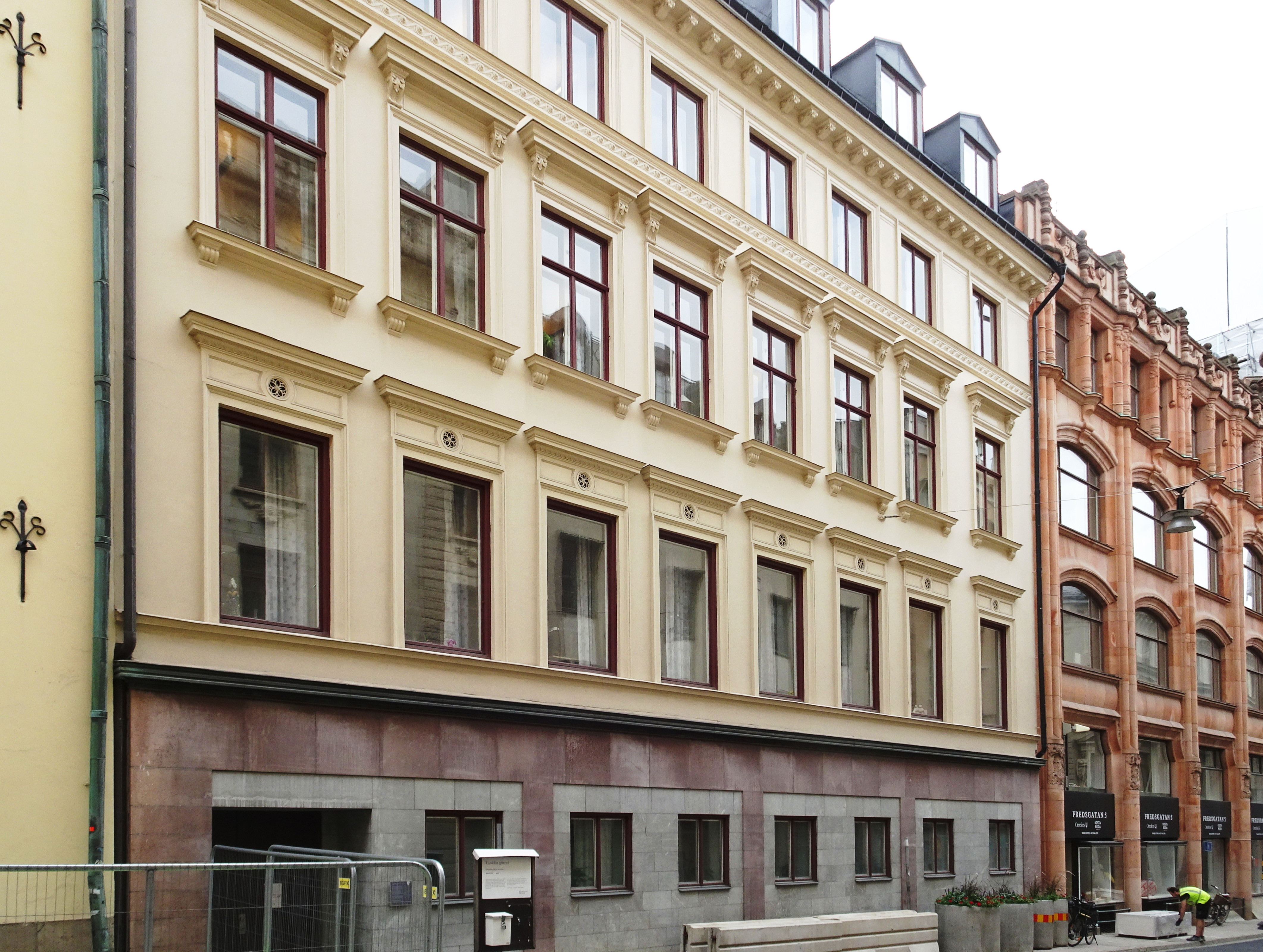 Kumlienska huset, Fredsgatan 3, arkitekt Axel Kumlien och Hjalmar Kumlien